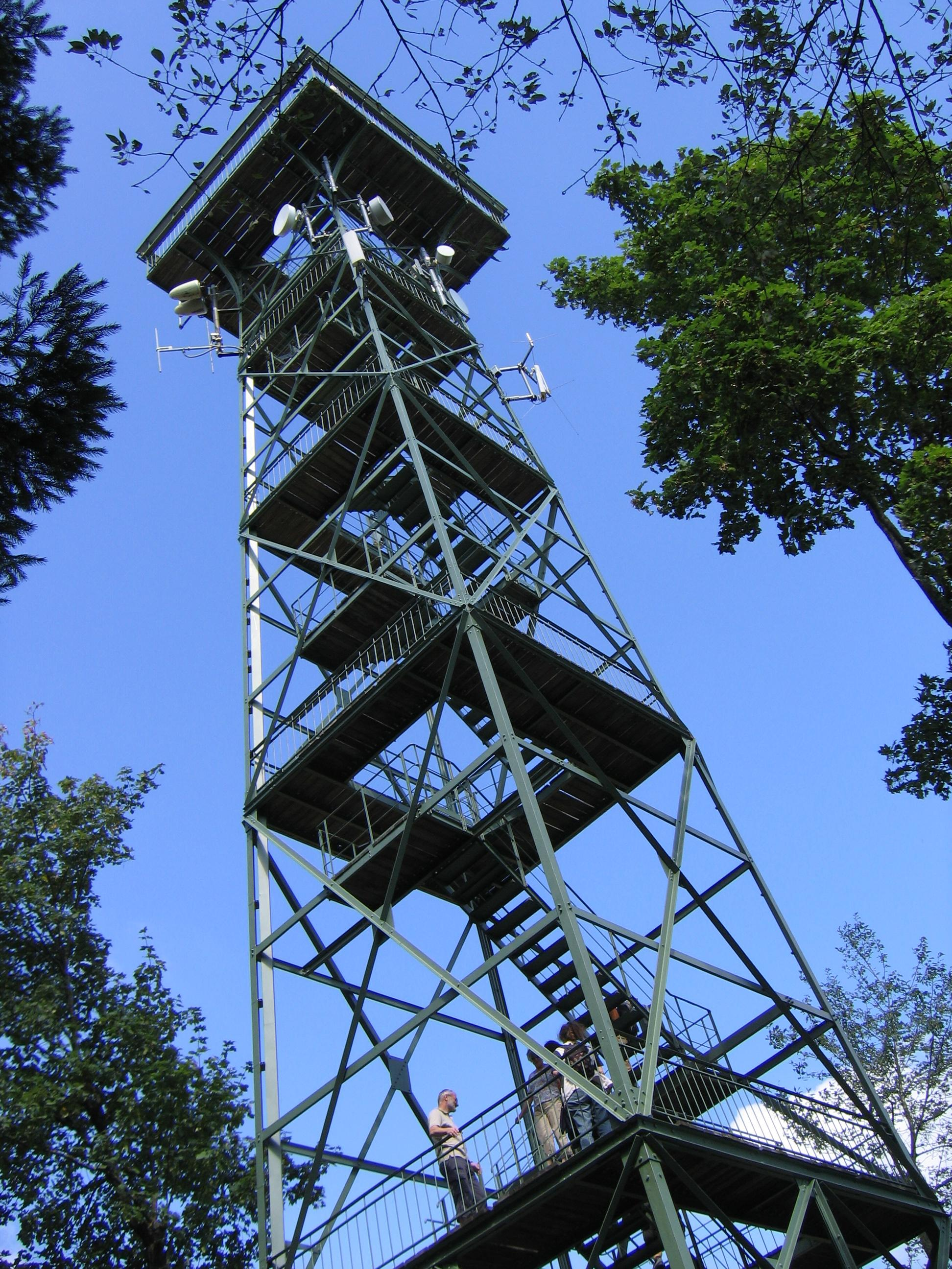 Deutschland - Baden-Württemberg - Bodenseekreis - Markdorf: Gehrenbergturm